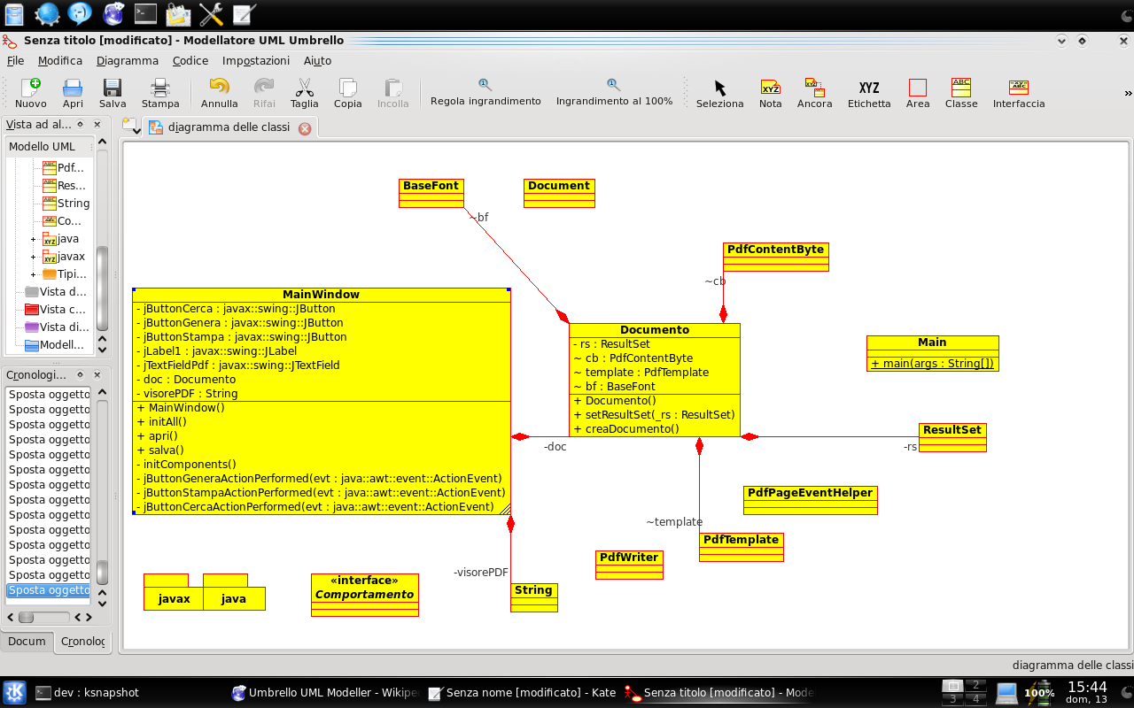 Screenshot di Umbrello UML Modeller